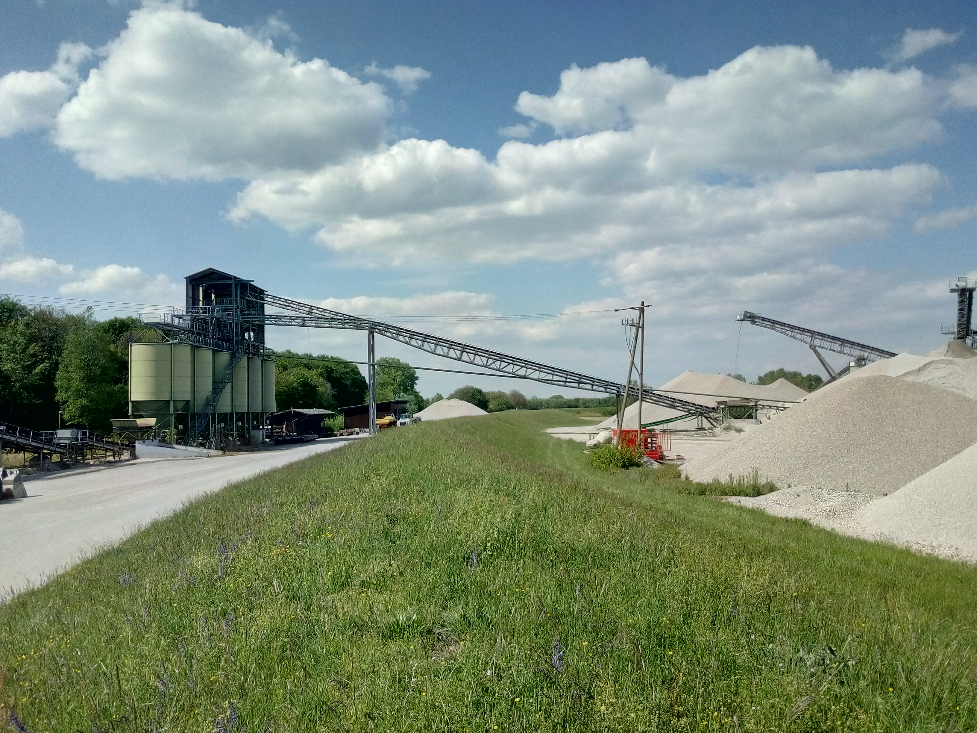 Kieswerk beidseits des Rhenhauptdeiches, rechts die Daxlander Au, Gemeinde Hagenbach, Landkreis Germersheim